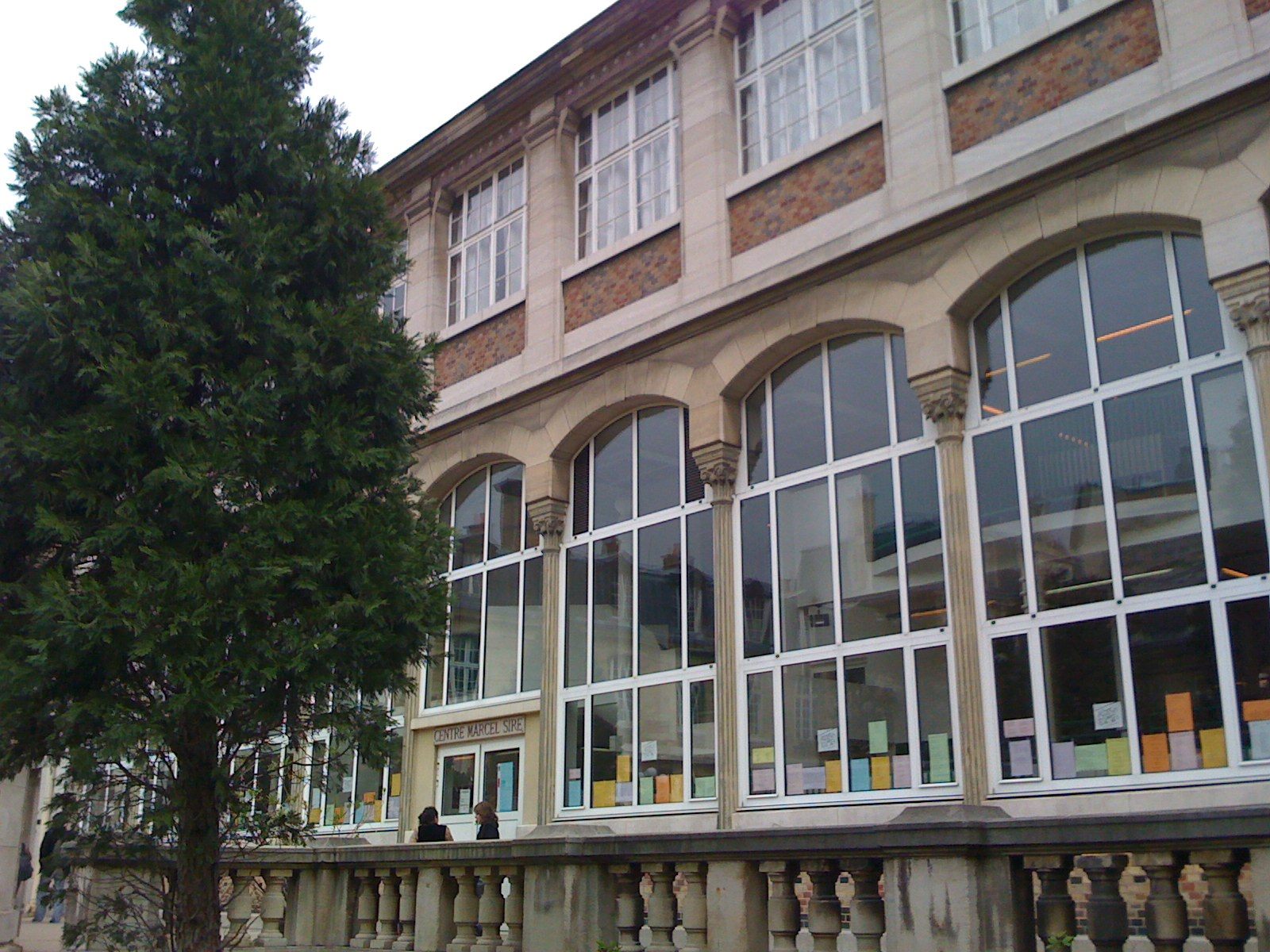 Centre Marcel Sire, le Centre de documentation et d'information (CDI) de Janson de sailly